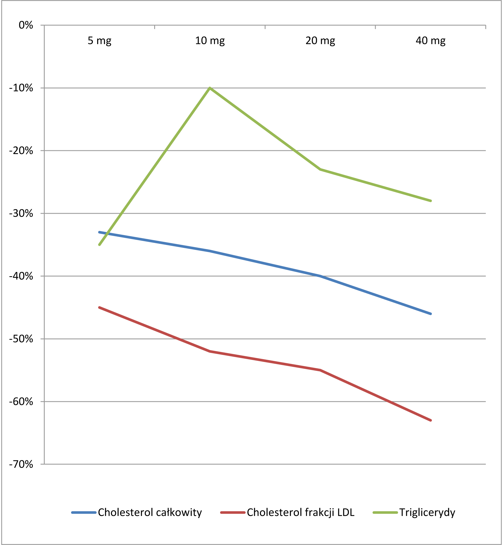 Wpływ rosuwastatyny na wskaźniki lipidowe (dane do wykresu za CRESTOR (rosuvastatin calcium) tablets)